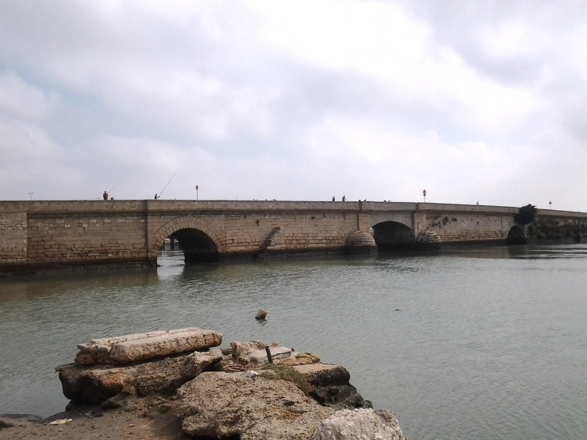 Puente Zuazo visto desde San Fernando